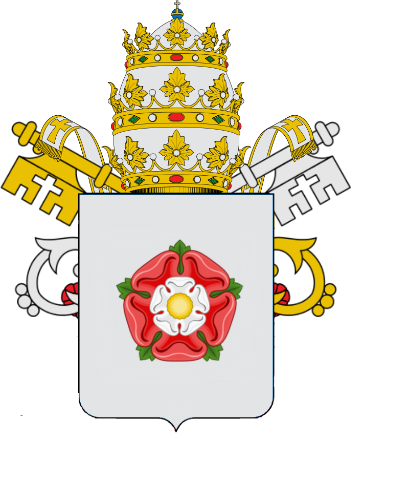 Escut de Reus anterior als anys 90, rectangular amb la punta arrodonida i apuntada